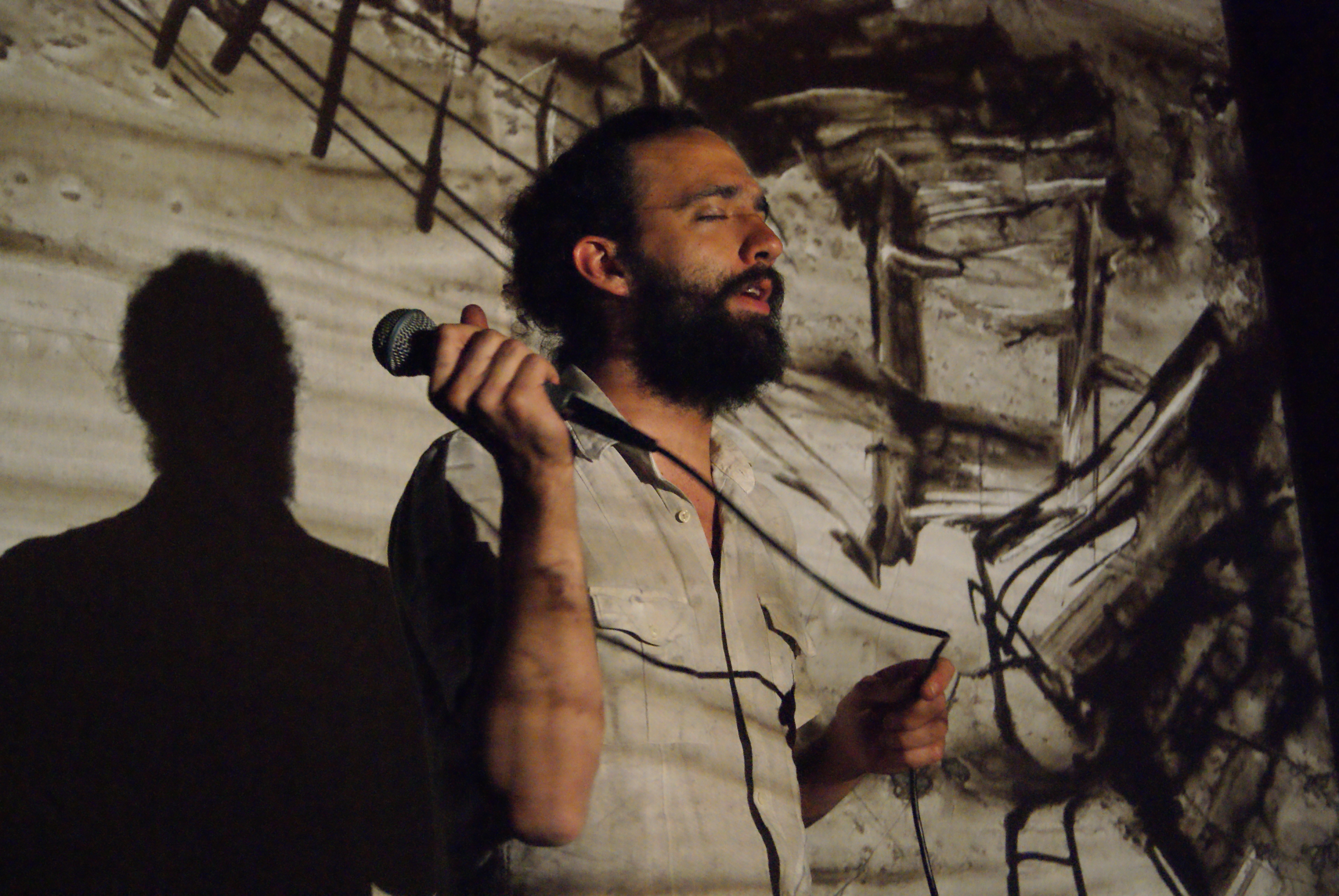 Juan Pablo Villa con Arturo López “Pío” (Cine a mano) en el Centro Cultural Creciente, Puebla, Pue. 4 de junio de 2010